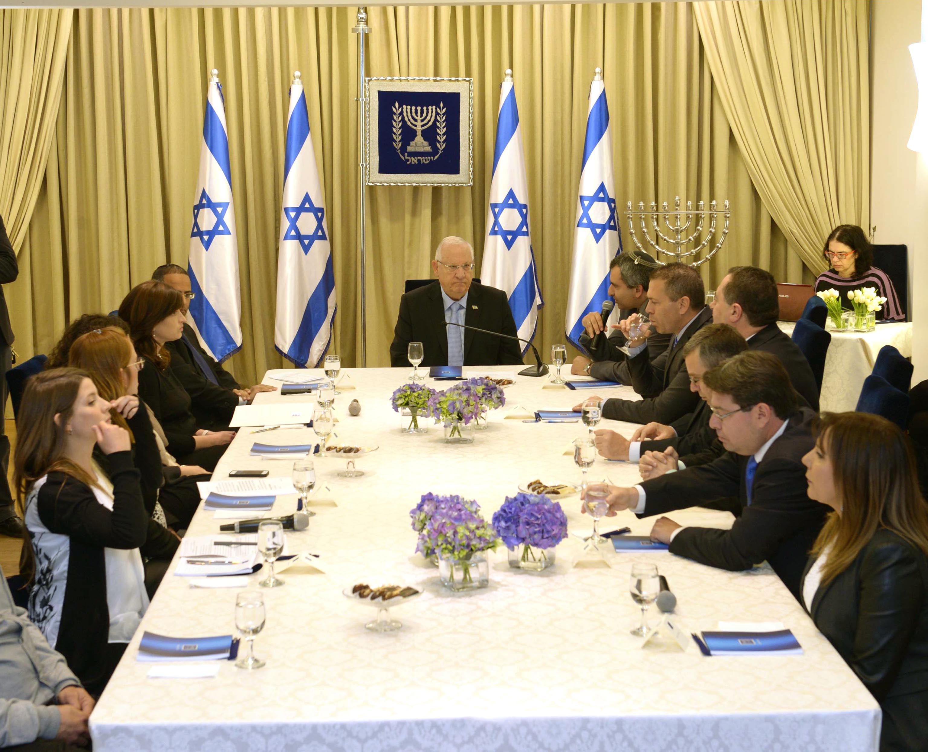 נשיא מדינת ישראל ראובן ריבלין פותח בהתייעצויות עם המפלגות השונות לקראת הרכבת הממשלה לאחר בחירות מרץ 2015 עם הליכוד